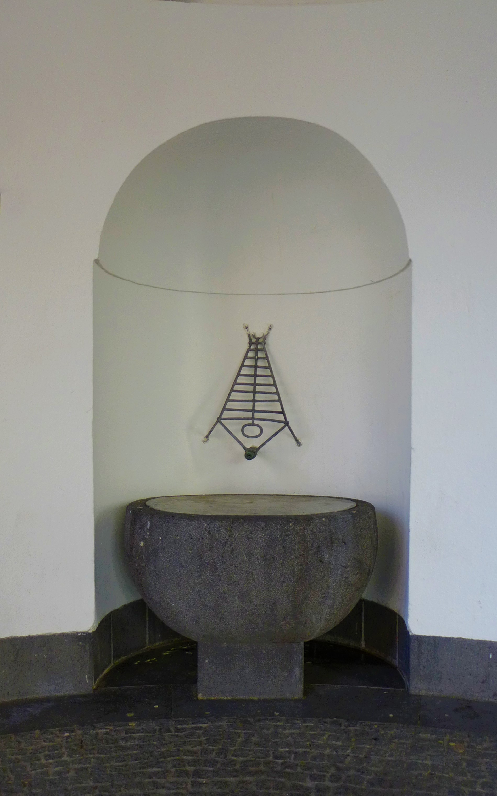 Rathaus St. Johann, Fischbrunnen